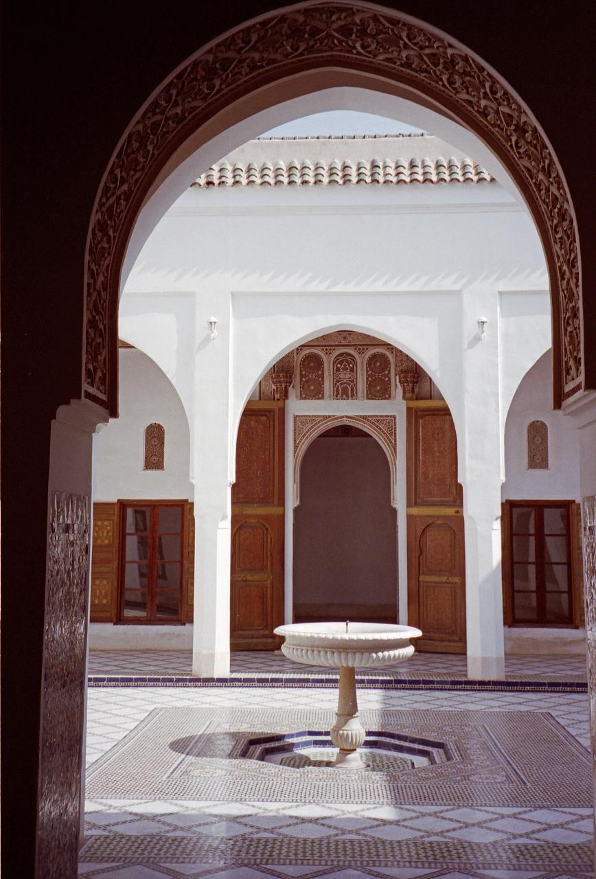 Morocco-68